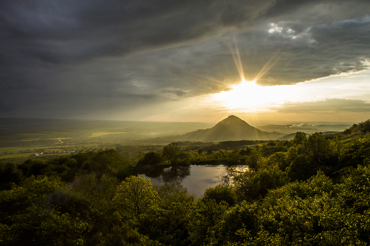 Гора Шелудивая, Предгорный район This image is related to the protected area of Russia number 2610120